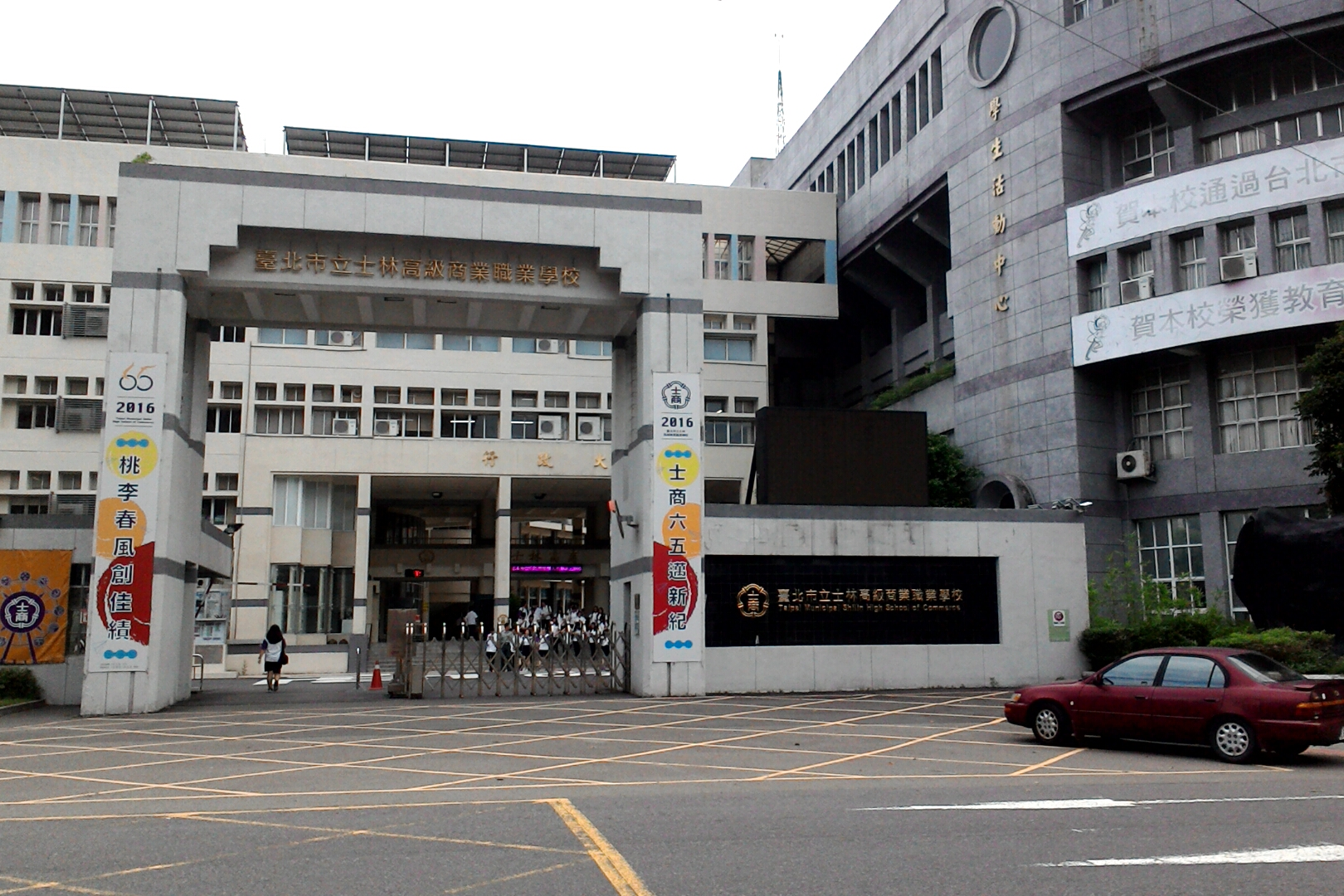 台北市立士林高級商業職業學校,台北市士林區後港次分區後港里